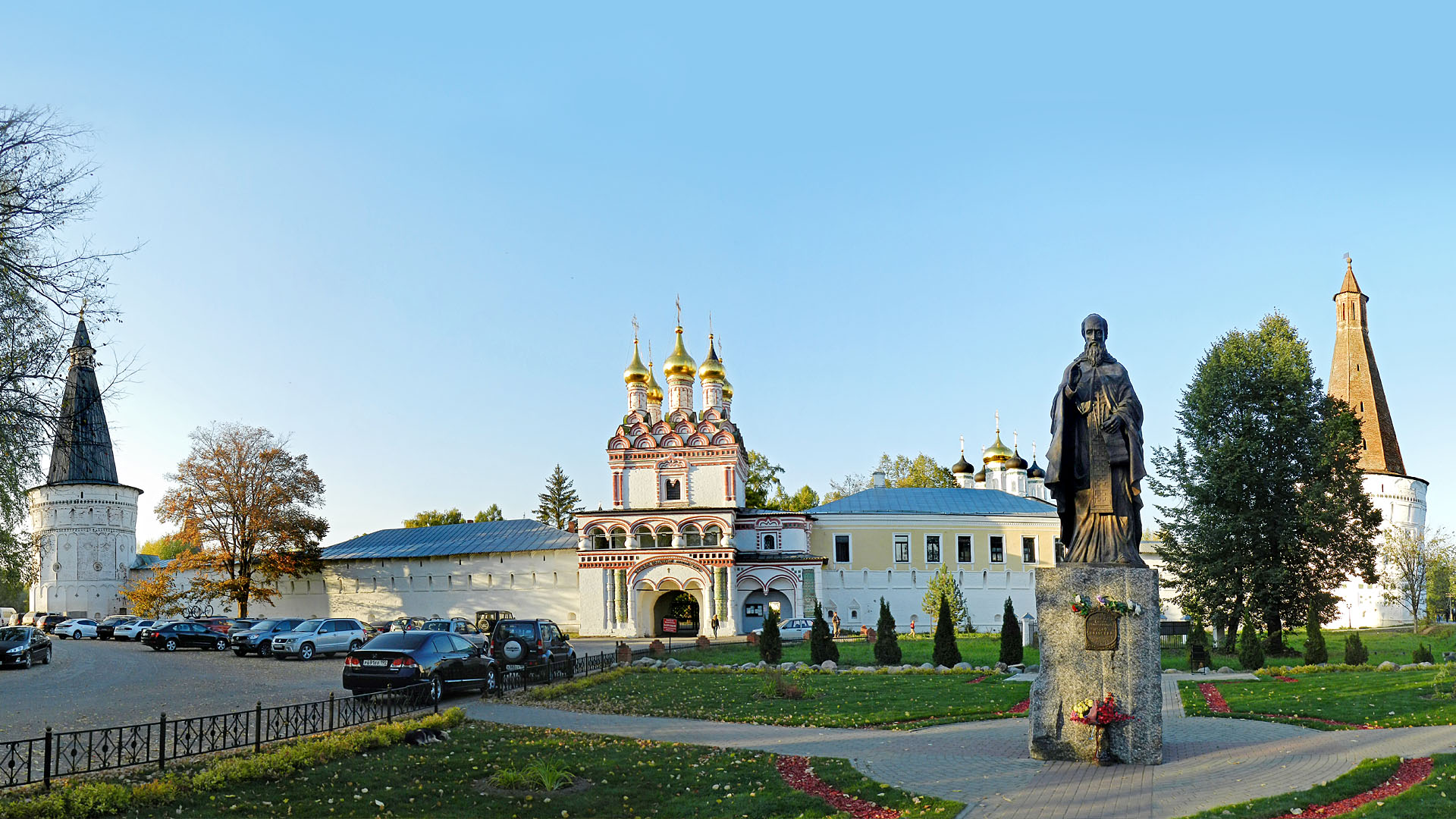 Иосифо-Волоцкий монастырь. Теряево, Волоколамский район Московской области